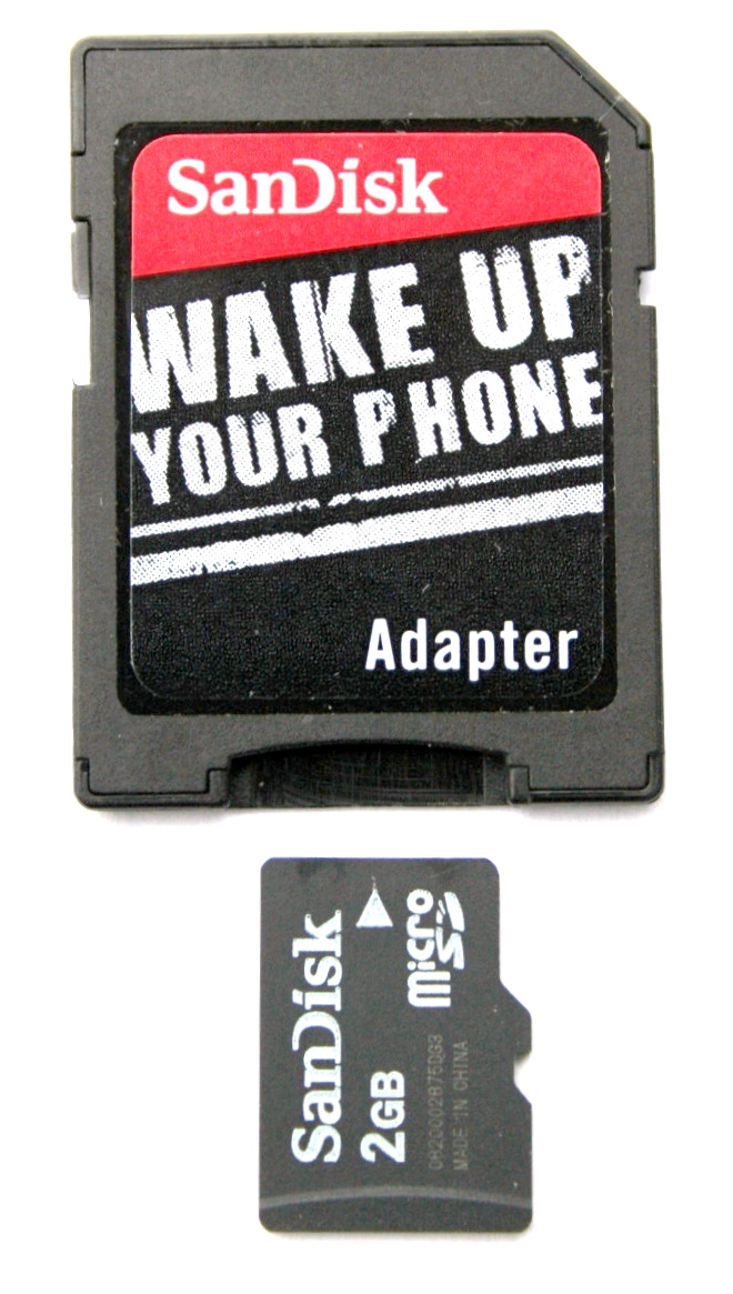 Micro-SD-Karte mit Adapter